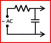 YG - RC filtresi, referans frekans değerinden yüksek frekansları geçirir, düşük frekansları söndürür. Ayrıca Türev işlevi de görmektedir.